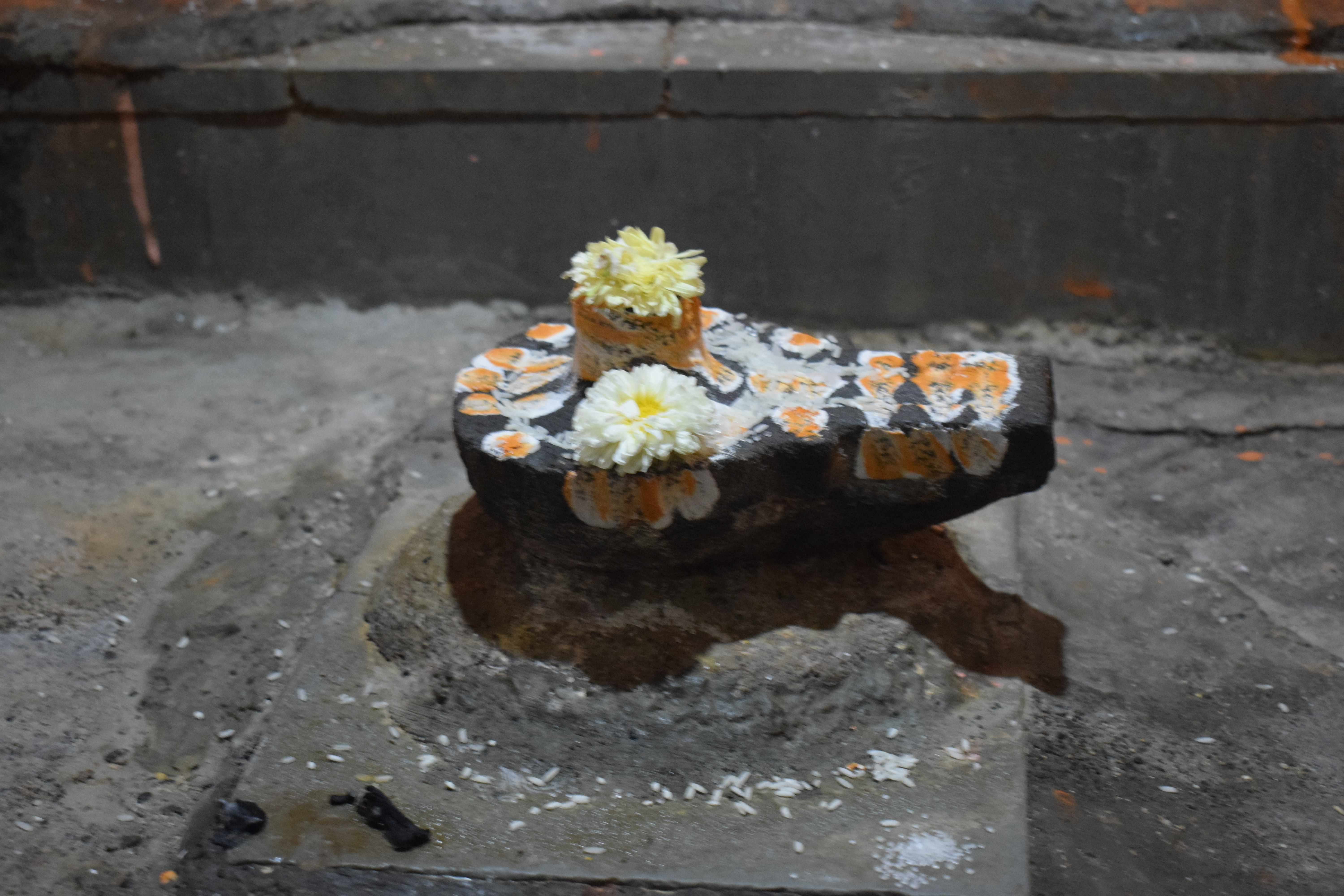 श्री अचलेश्वर लिंग